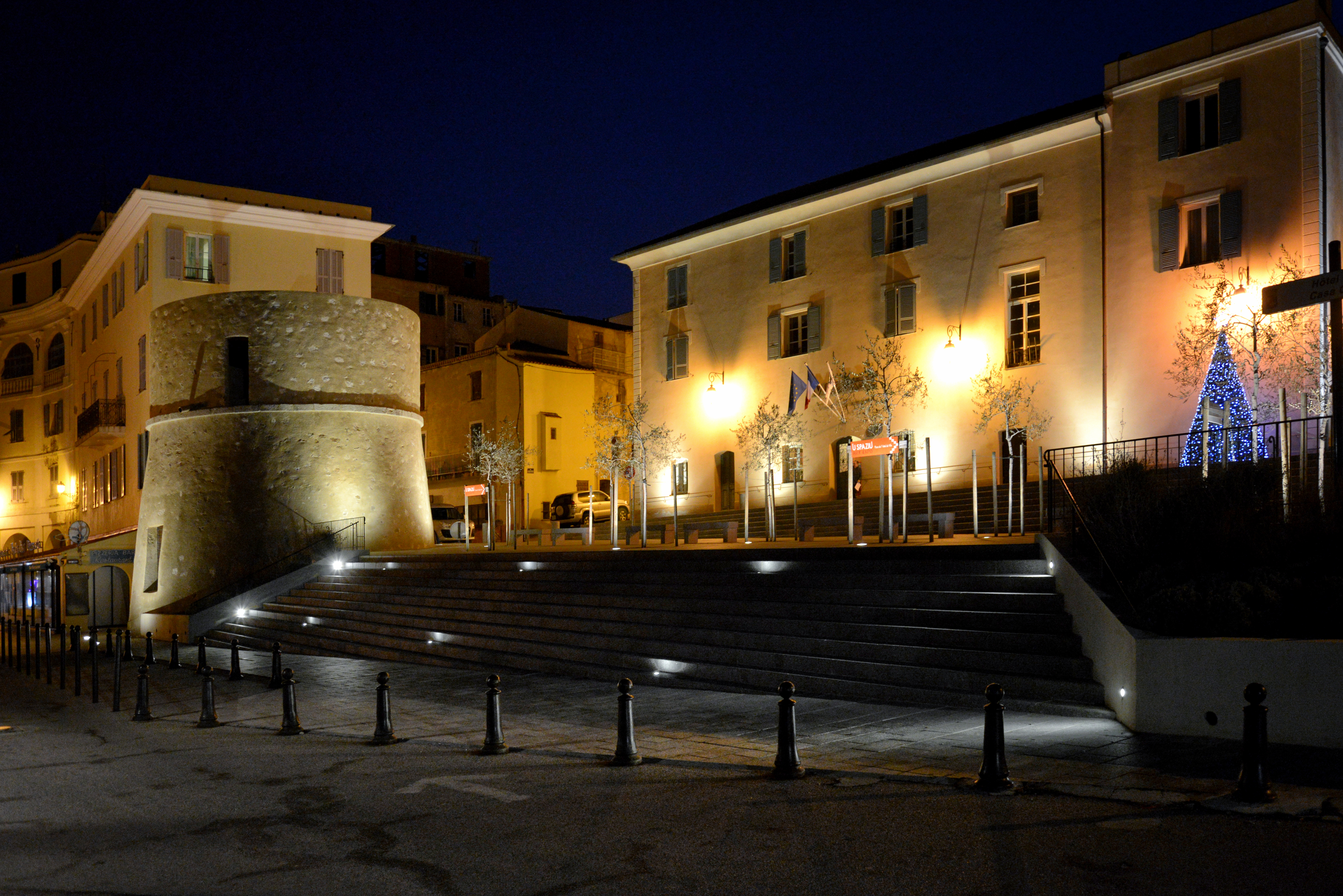 L'Île-Rousse, Balagne (Corse) - Tour de Scalu et la mairie.